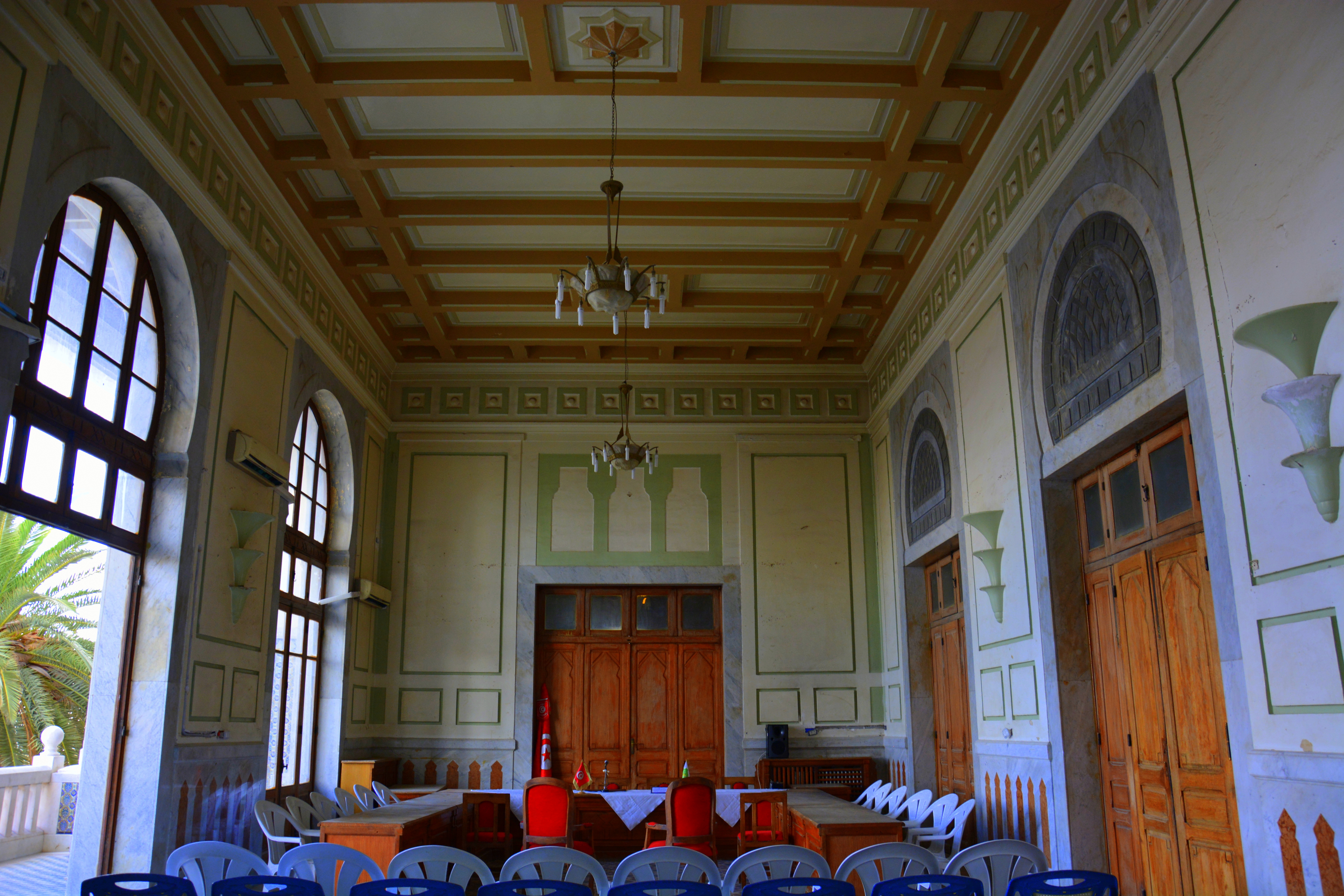 Siège actuel de la municipalité de Béja